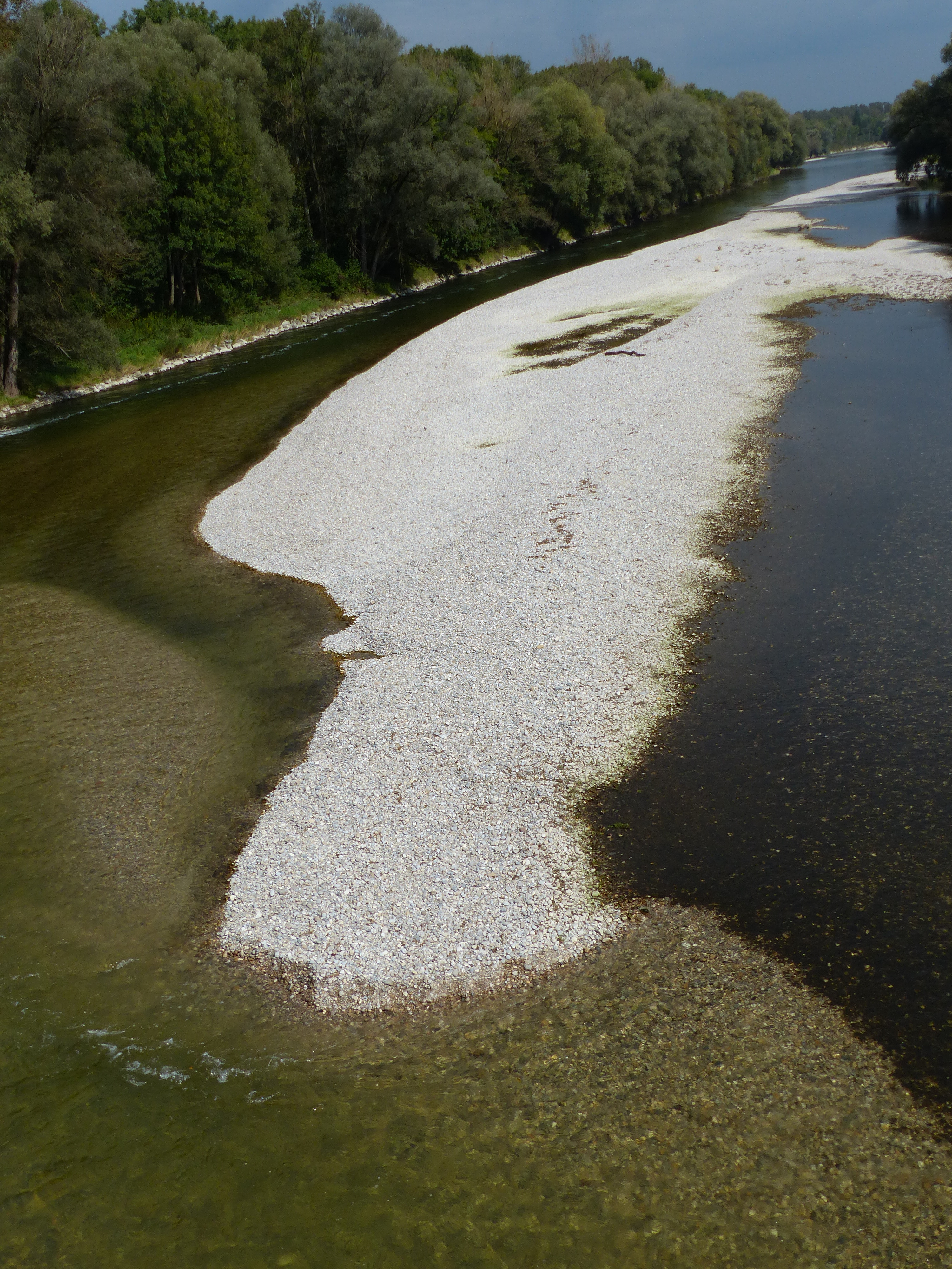 Stromschnelle und Kiesbank am Zusammenfluss von Isar (rechts) und Amper (links) bei Volkmannsdorf